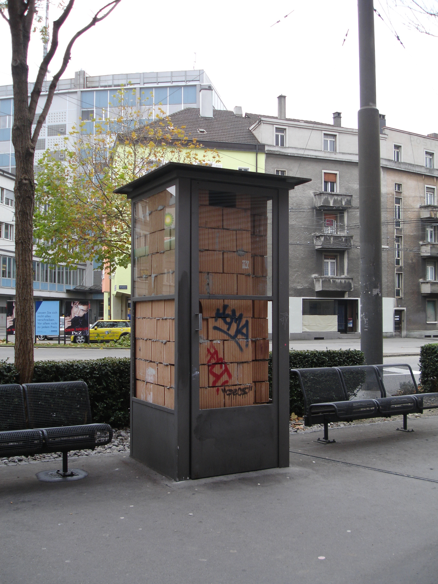 Neubau (1994) Swisscom (ehem. Telecom)in Biel Kunst und Bau Künstler: Eric Hattan Werk: Telefonkabine Modell 1965 116% vergrössert.